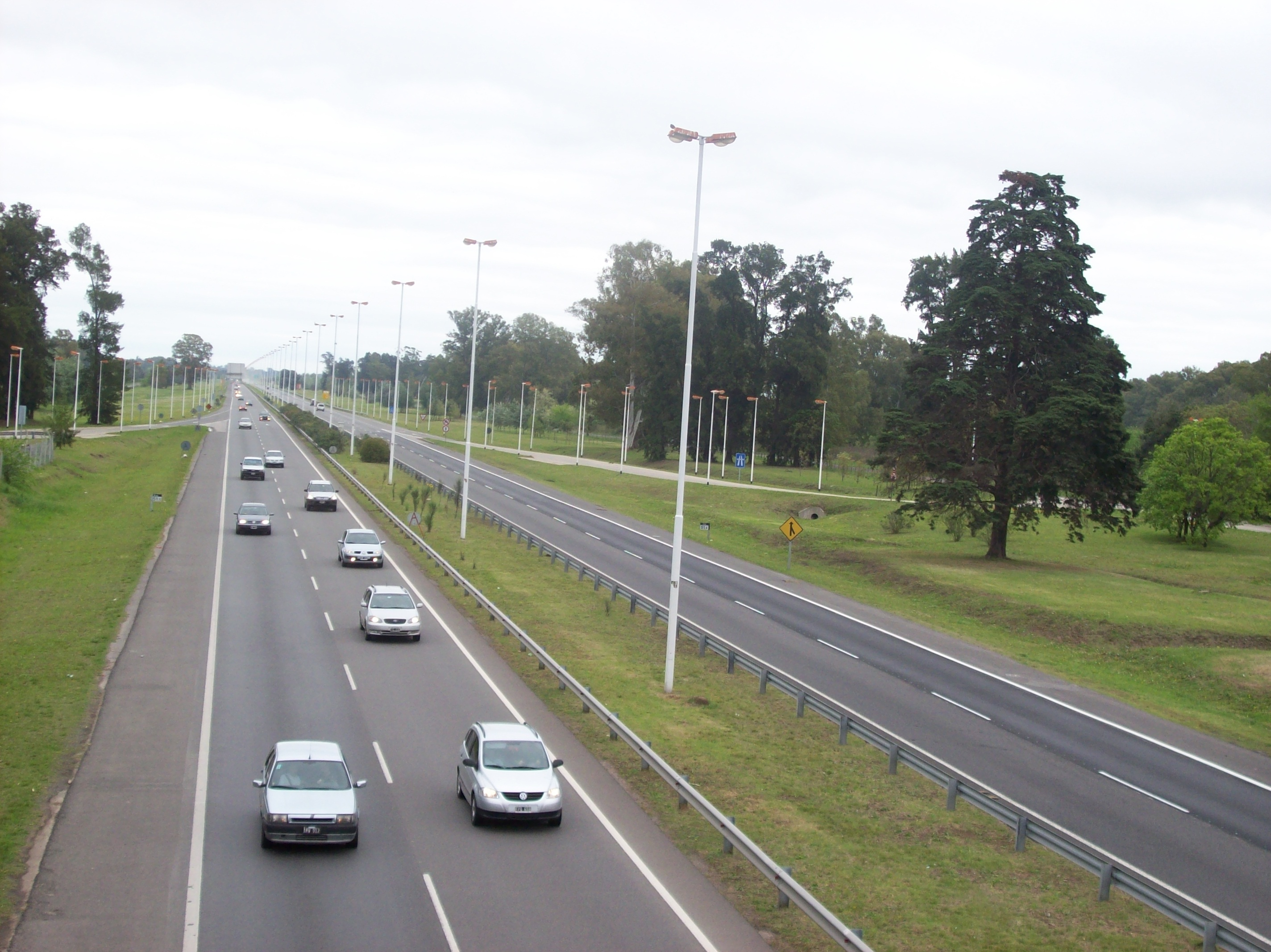 Autopista Ezeiza - Cañuelas (Ruta Nacional 205 km 51) desde el puente de Vicente Casares, Partido de Cañuelas, Provincia de Buenos Aires, Argentina.